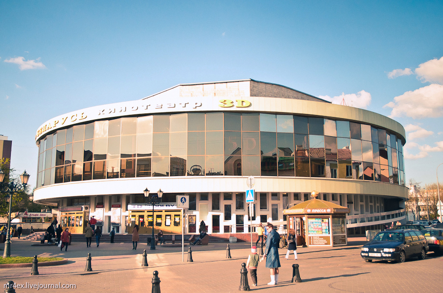 Брэст. Савецкая вуліца